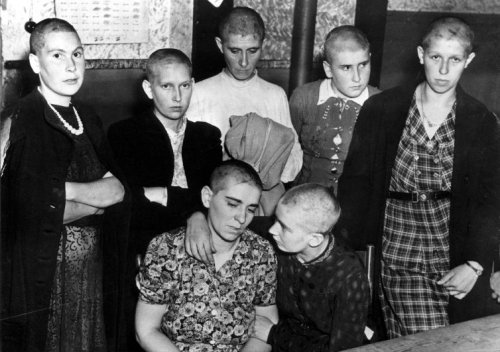 Moffenmeiden/moffenhoeren kaalgeschoren, Tweede Wereldoorlog